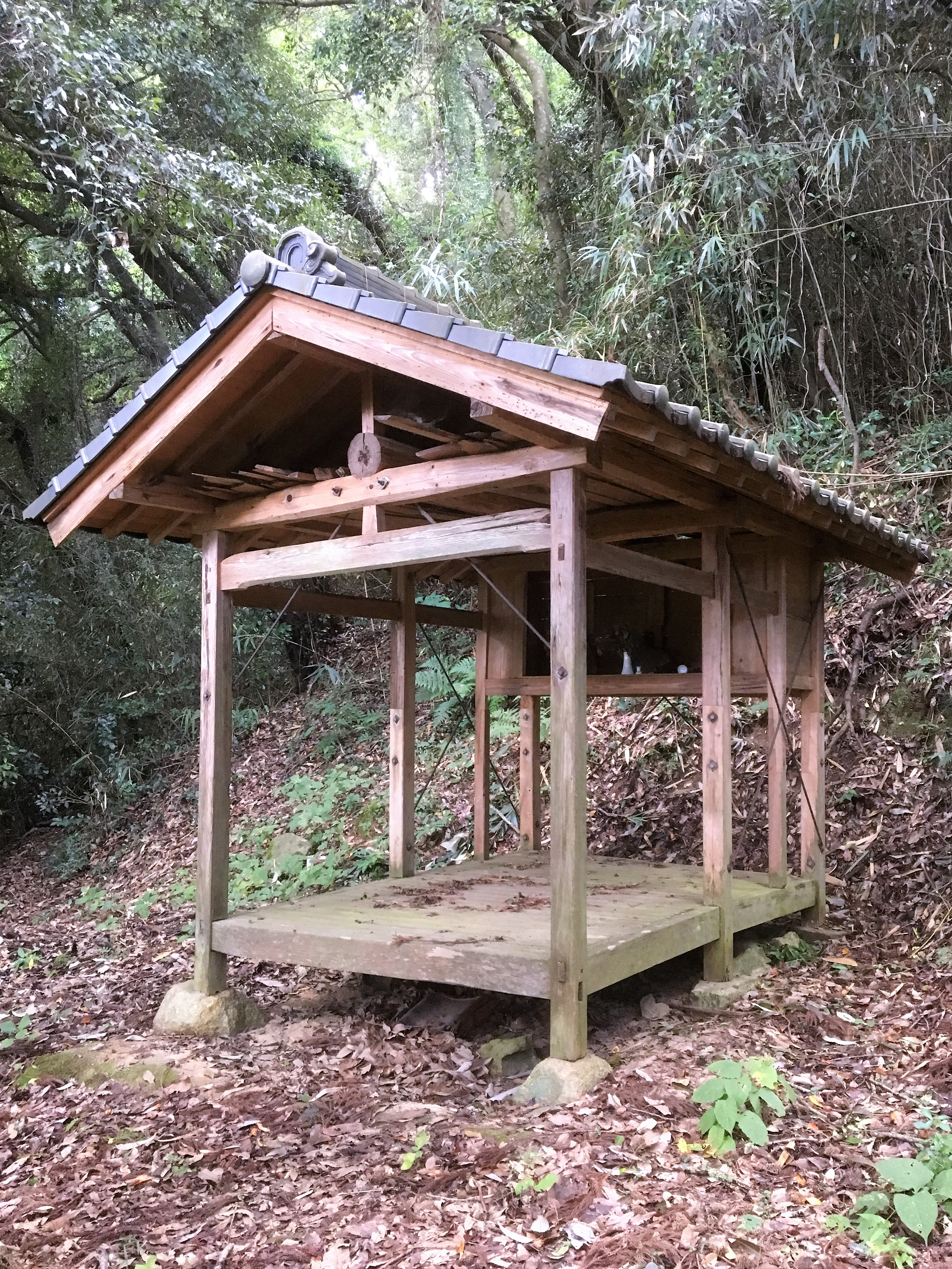 広島県府中市土生町の辻堂。6本（8本柱？）。山の中にあり、すぐしたの幹線道路からは見えない。3mほど下にも辻堂があり（別にアップロード）。荒廃しつつある。2017年9月撮影。